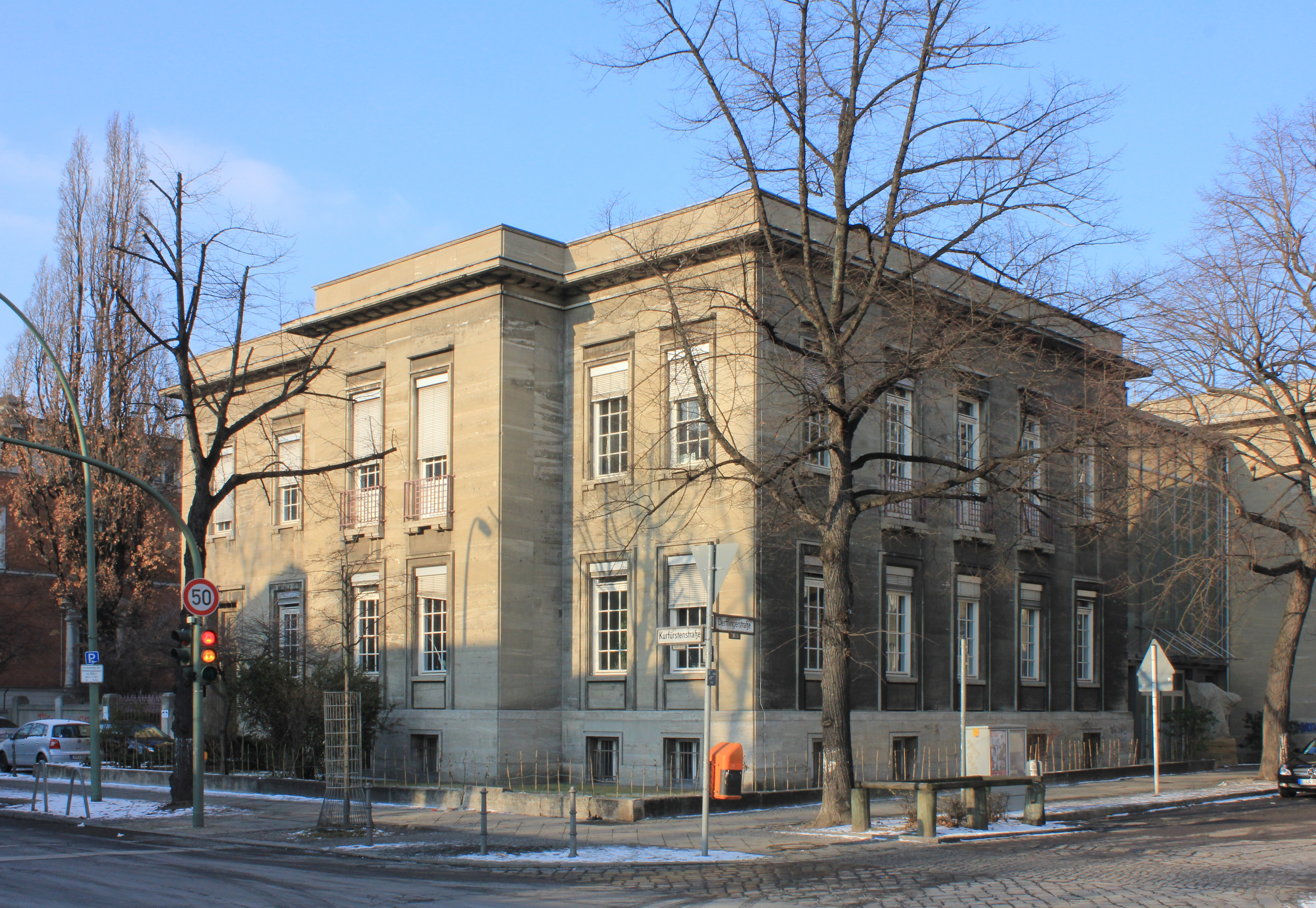 Villa Schwatlo 1879 von Carl Schwatlo, Umbau 1938-40 von Otto Sperber